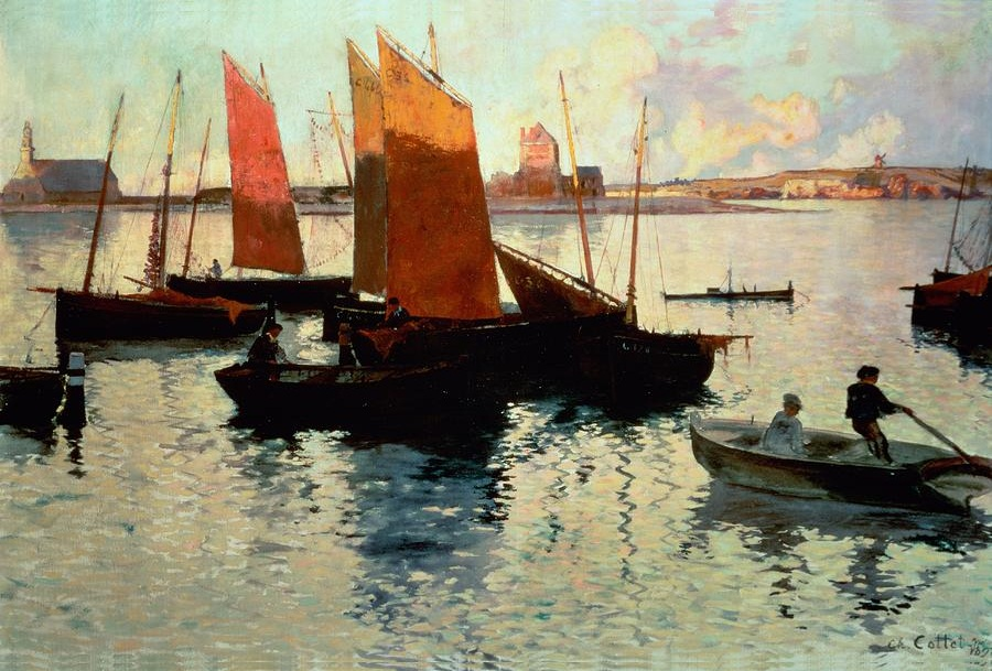 "Rayons du soir", Oil on Canvas, 21.5 x 32 in. / 54.6 x 81.3 cm.